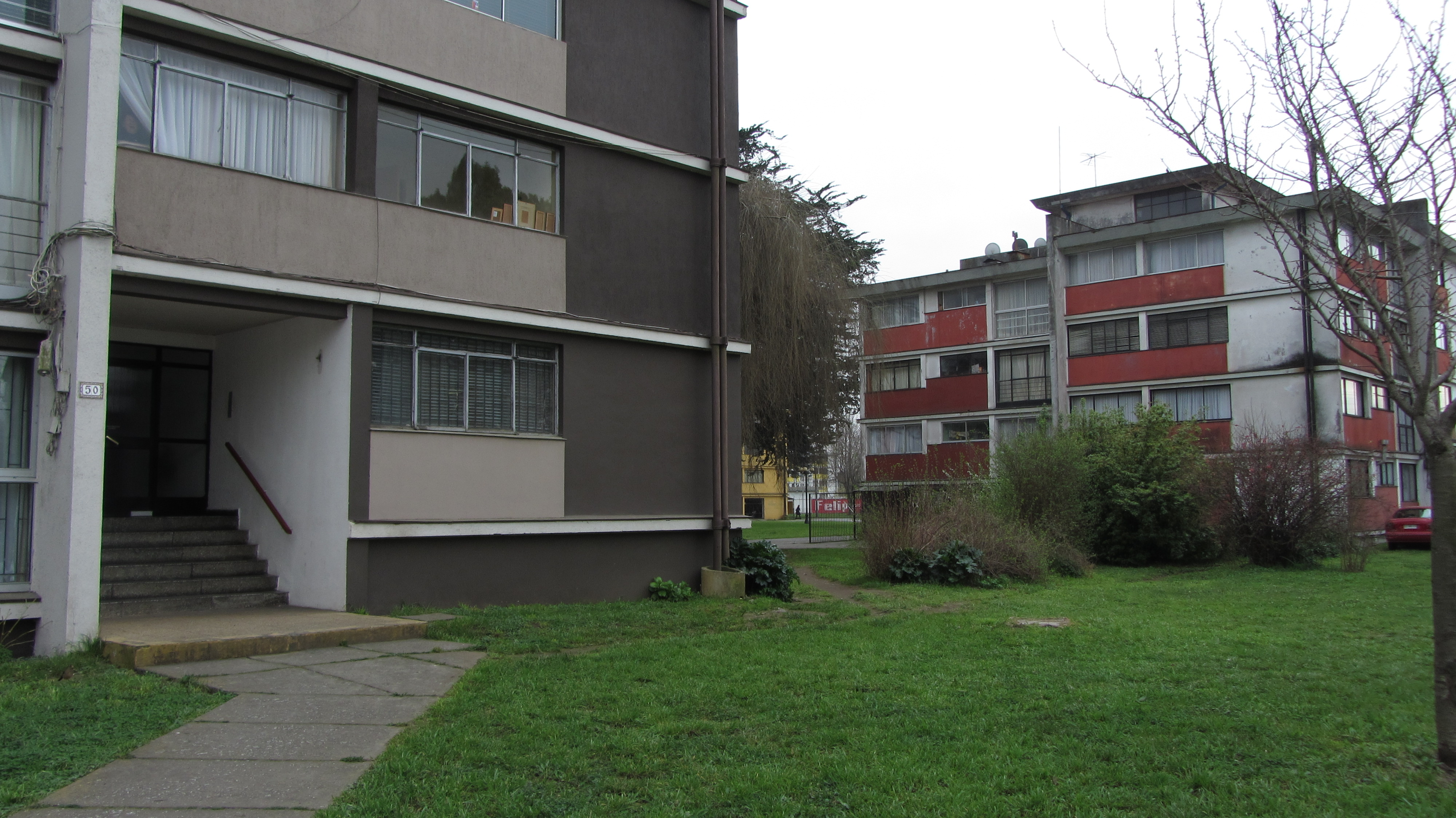 Edificios característicos de la Villa San Pedro San Pedro de la Paz Gran Concepción, Chile